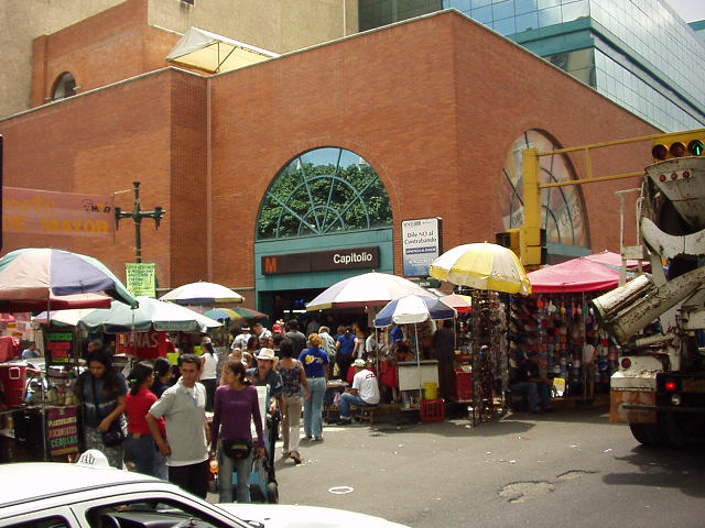 Capitolio Station of Caracas Metro. Caracas, Venezuela.